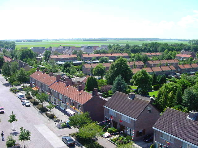 Afbeelding dorp Tollebeek in vogelvlucht. Locatie St. Hubertuslaan.